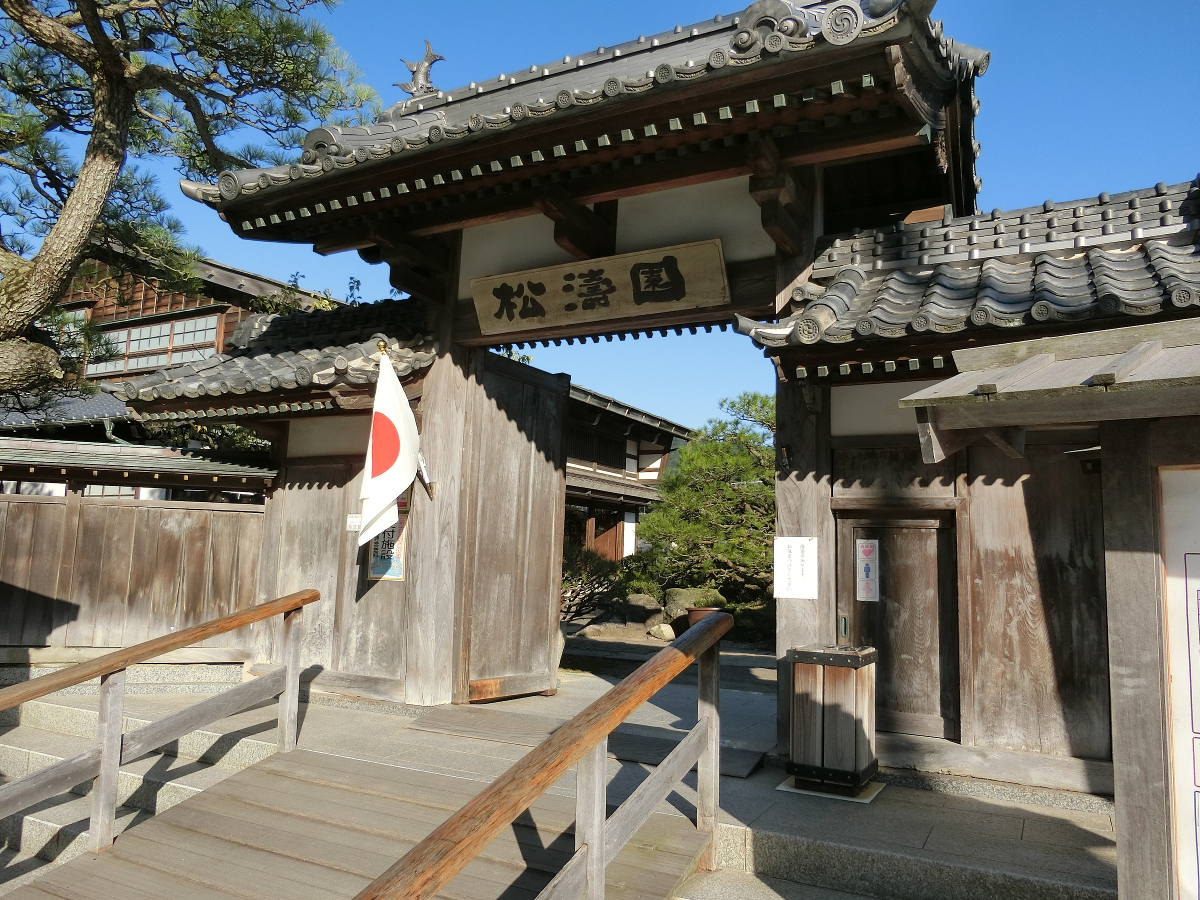 松濤園（呉市下蒲刈島）。